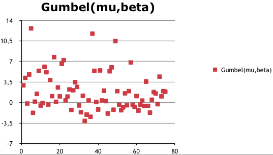 Gumbel-Realisationen (mu,beta)